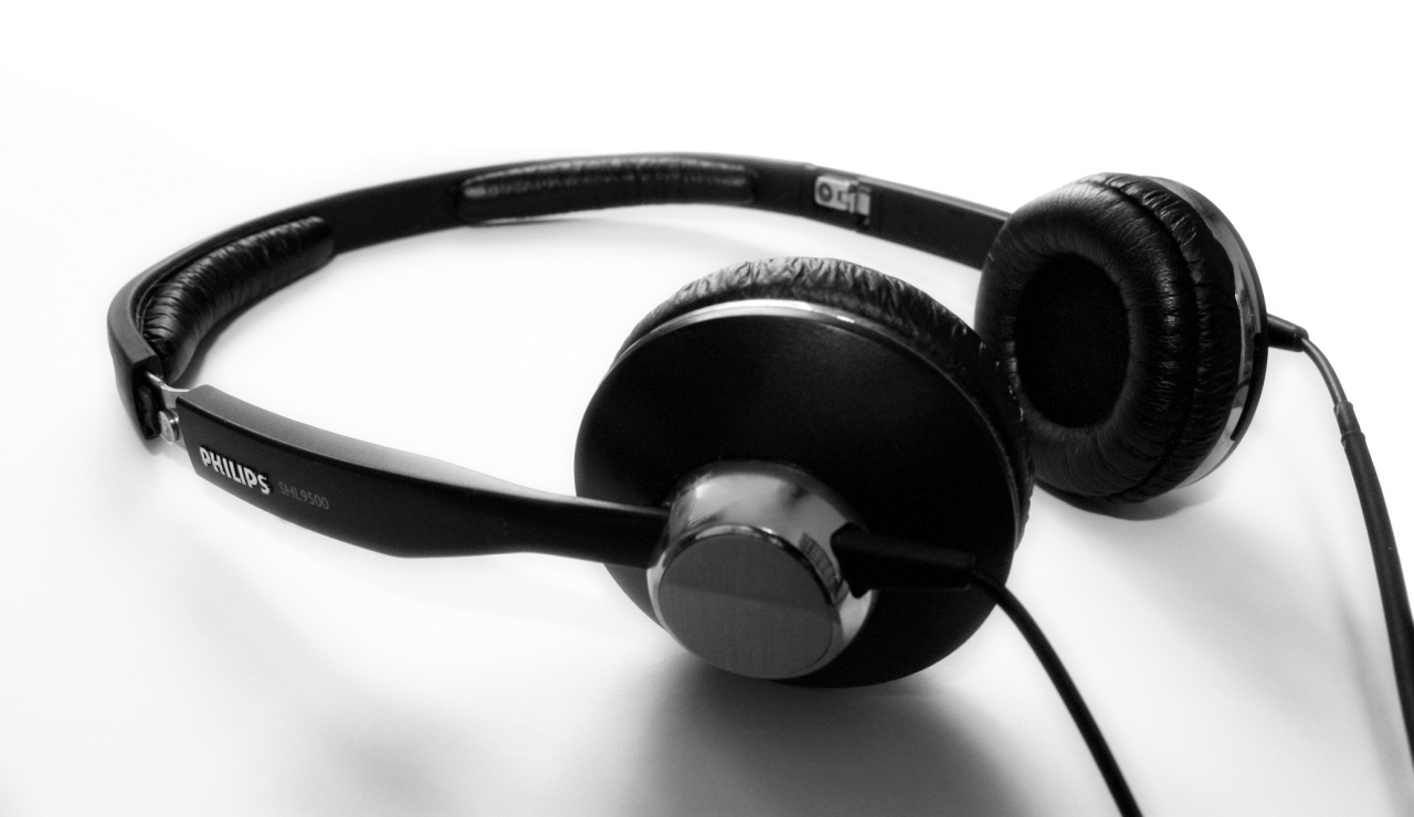 Słuchawki Philipsa.